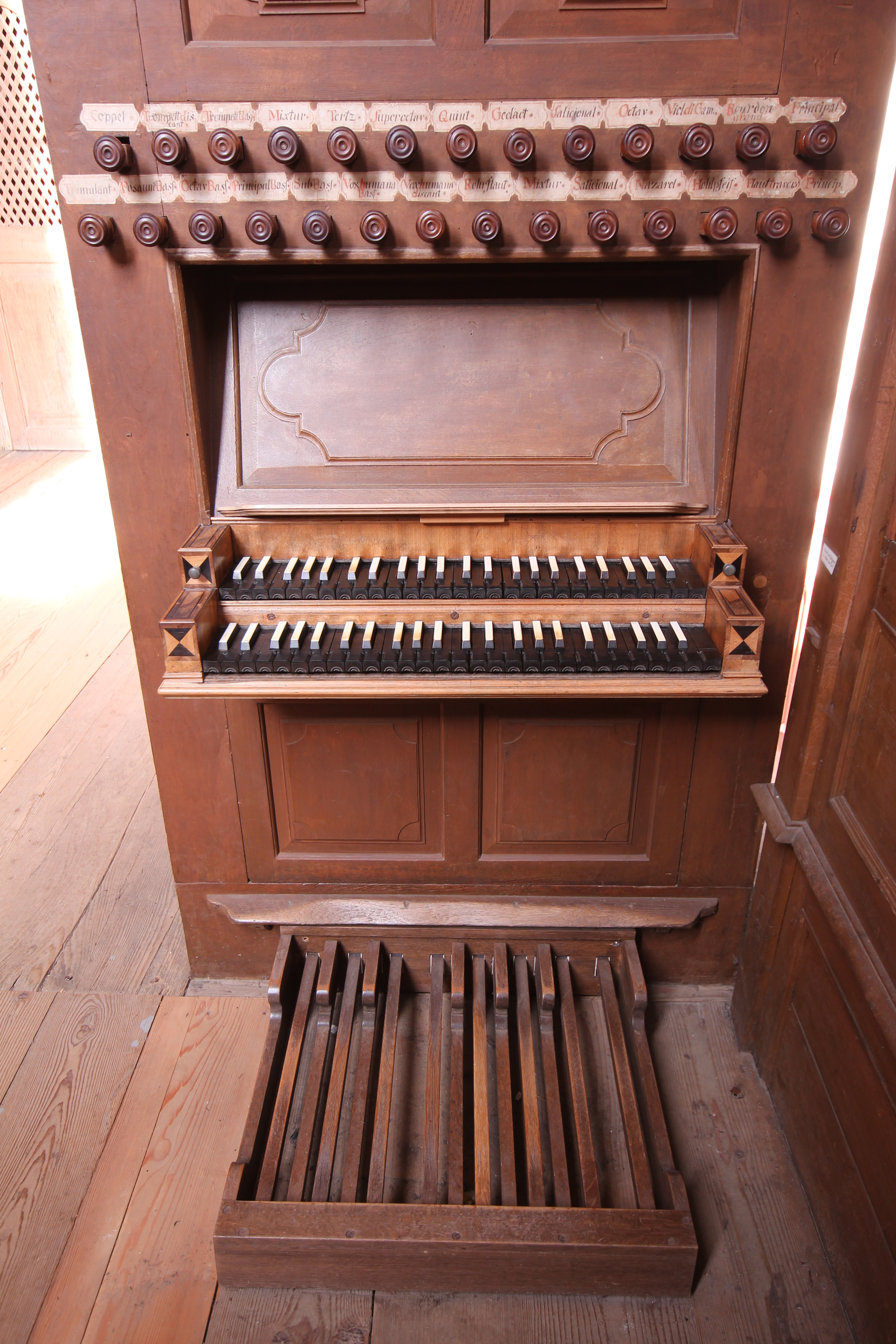 Spielanlage der Schöler-Orgel der Klosterkirche zur Solms-Altenberg